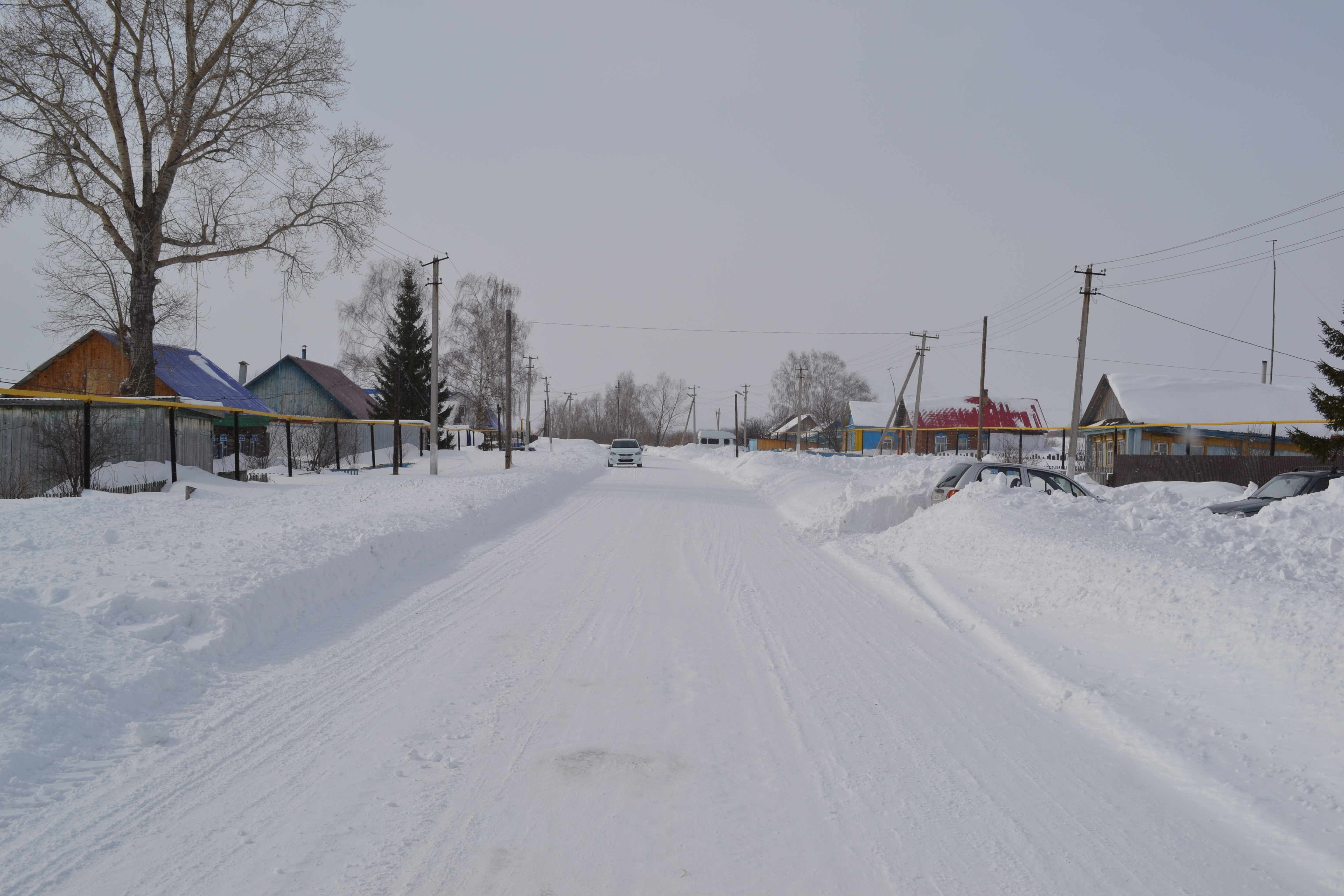 Ул. Центральная в поселке Кальтовка